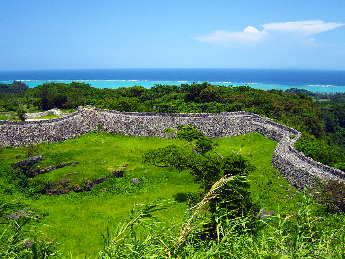 今帰仁城跡 (Nakijin Castle Site) 23 Jul, 2011